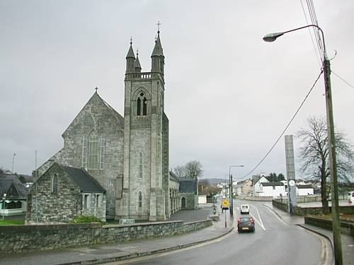 Stranorlar